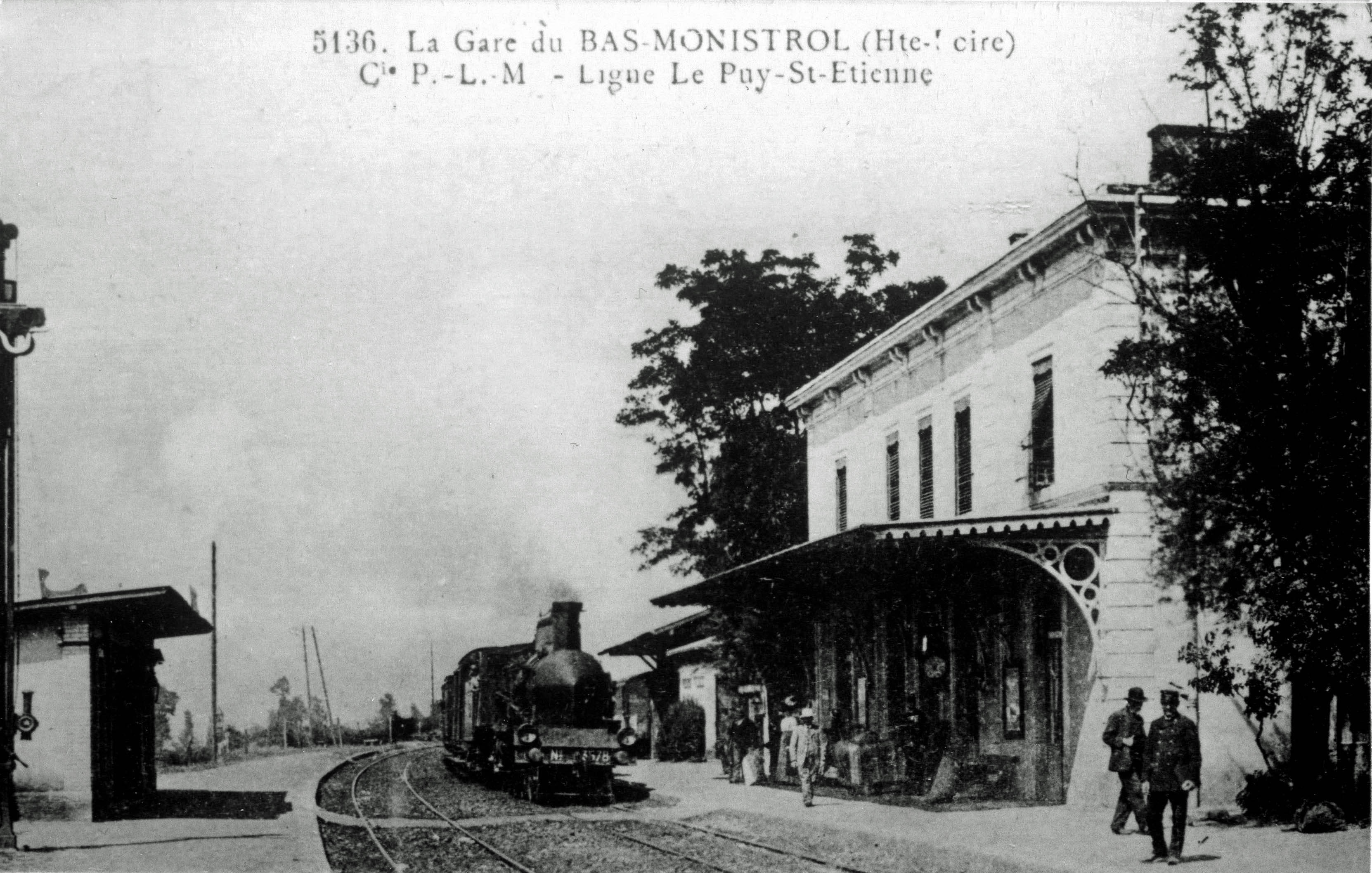 Gare de Bas-Monistrol - quais